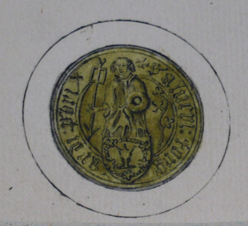 Seglmerket til Alv Torgardson